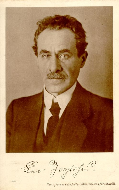 Leo Jogiches, ca. 1910